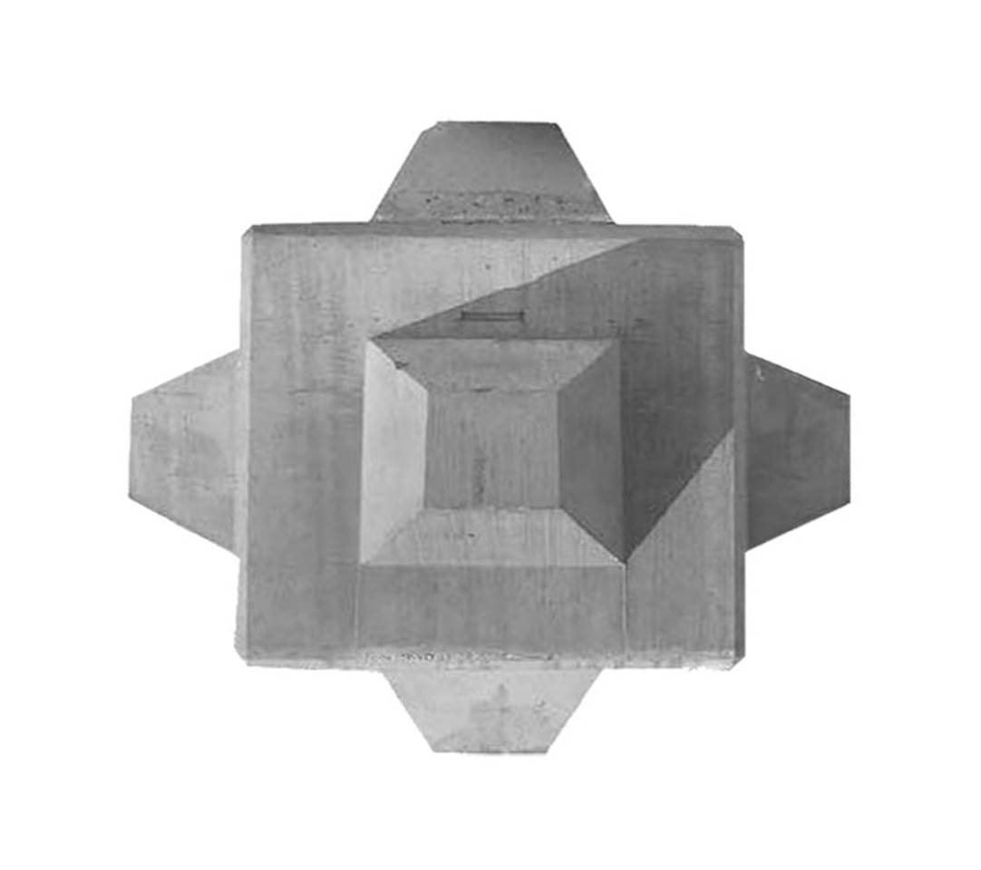 Elemento para la formación de diques en talud